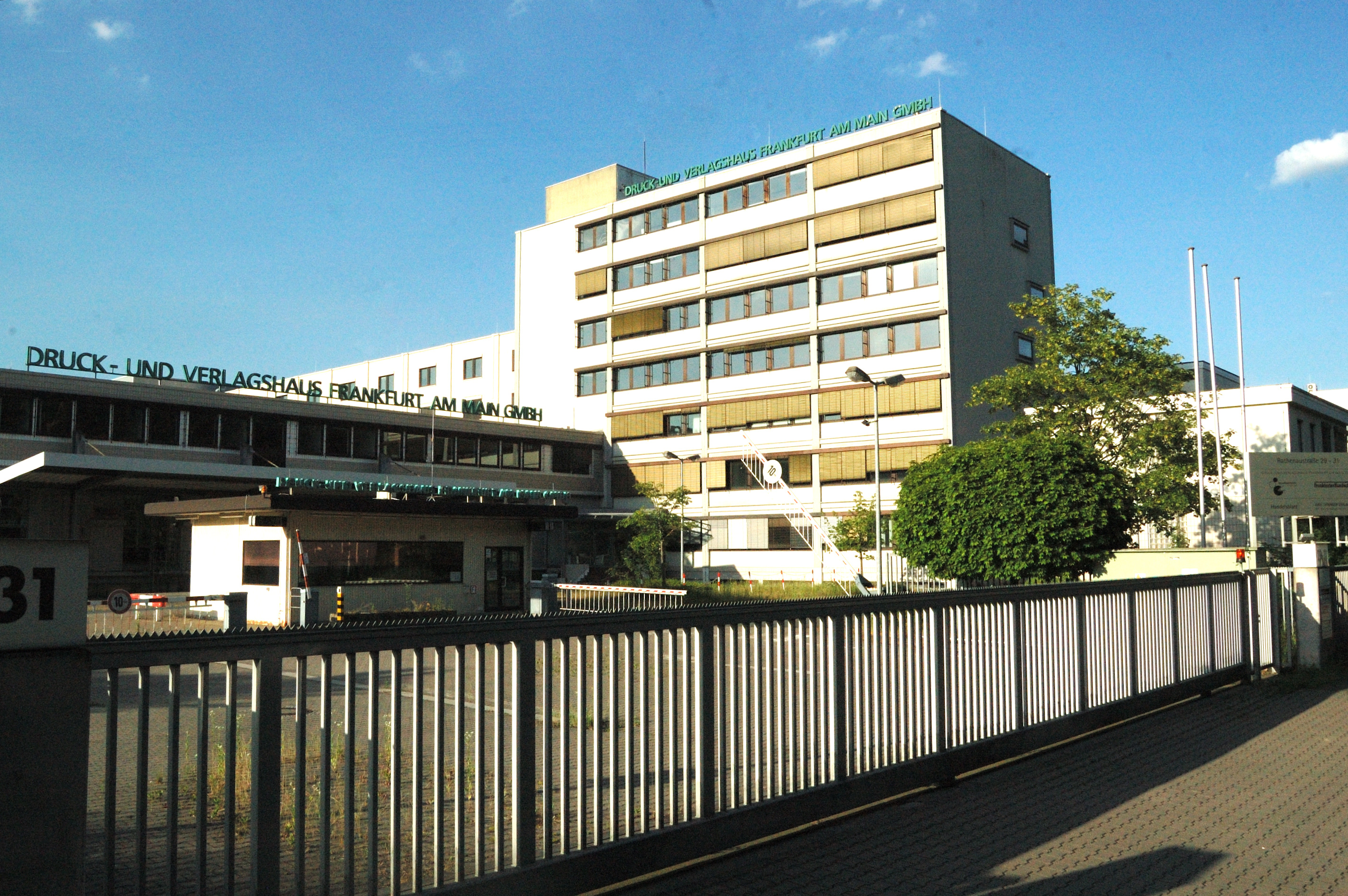 Ehemaliges Druck- und Verlagshaus der Frankfurter Rundschau in Neu-Isenburg